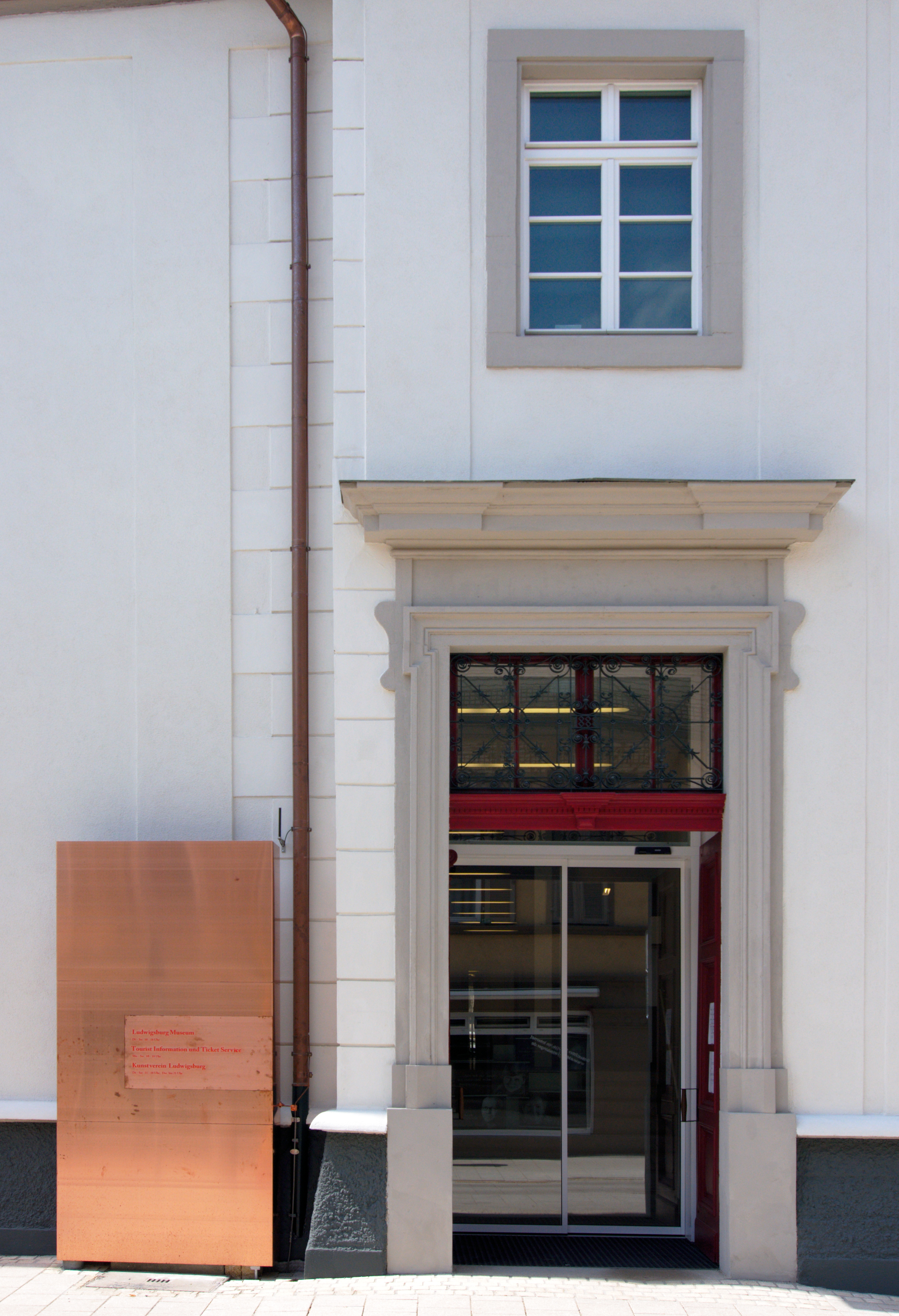 Eingang zum Ludwigsburger MIK Museum Information Kunst in der Eberhardstraße 1